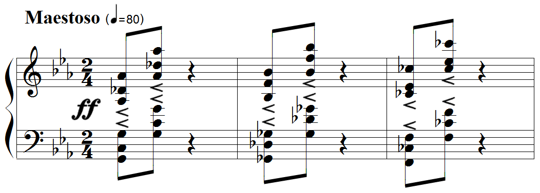 Louis Vierne, Quintette op.42, 3e mouvement, premières mesures